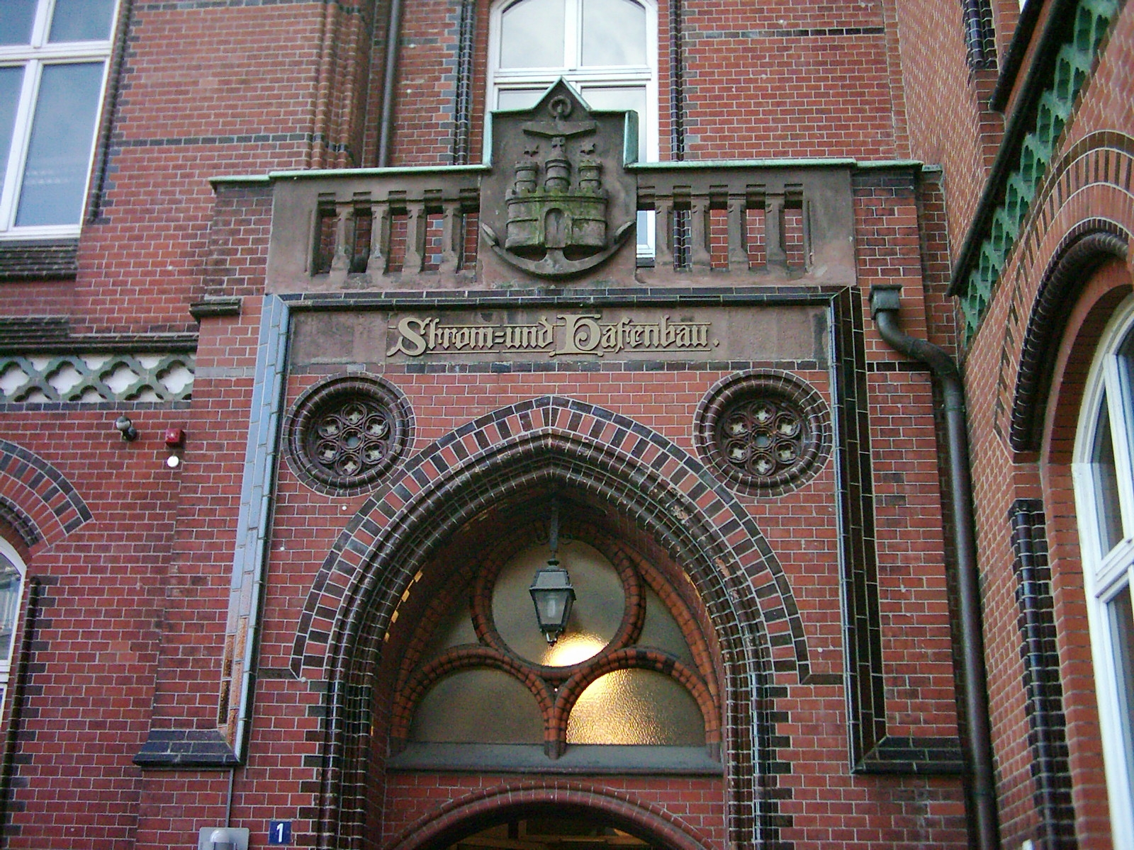 Altes Gebäude der Behörde für Strom- und Hafenbau (heute Hamburg Port Authority) in der Dalmannstraße, Hamburg-Klostertor. This is a photograph of an architectural monument.